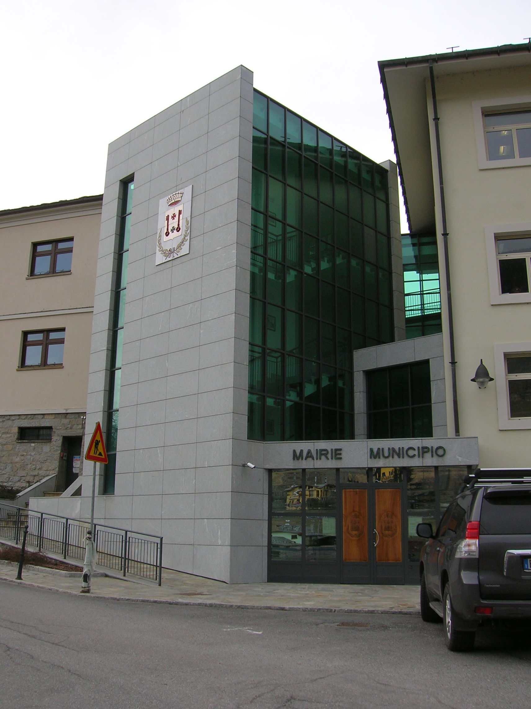 municipio di Saint-Pierre (Italy)